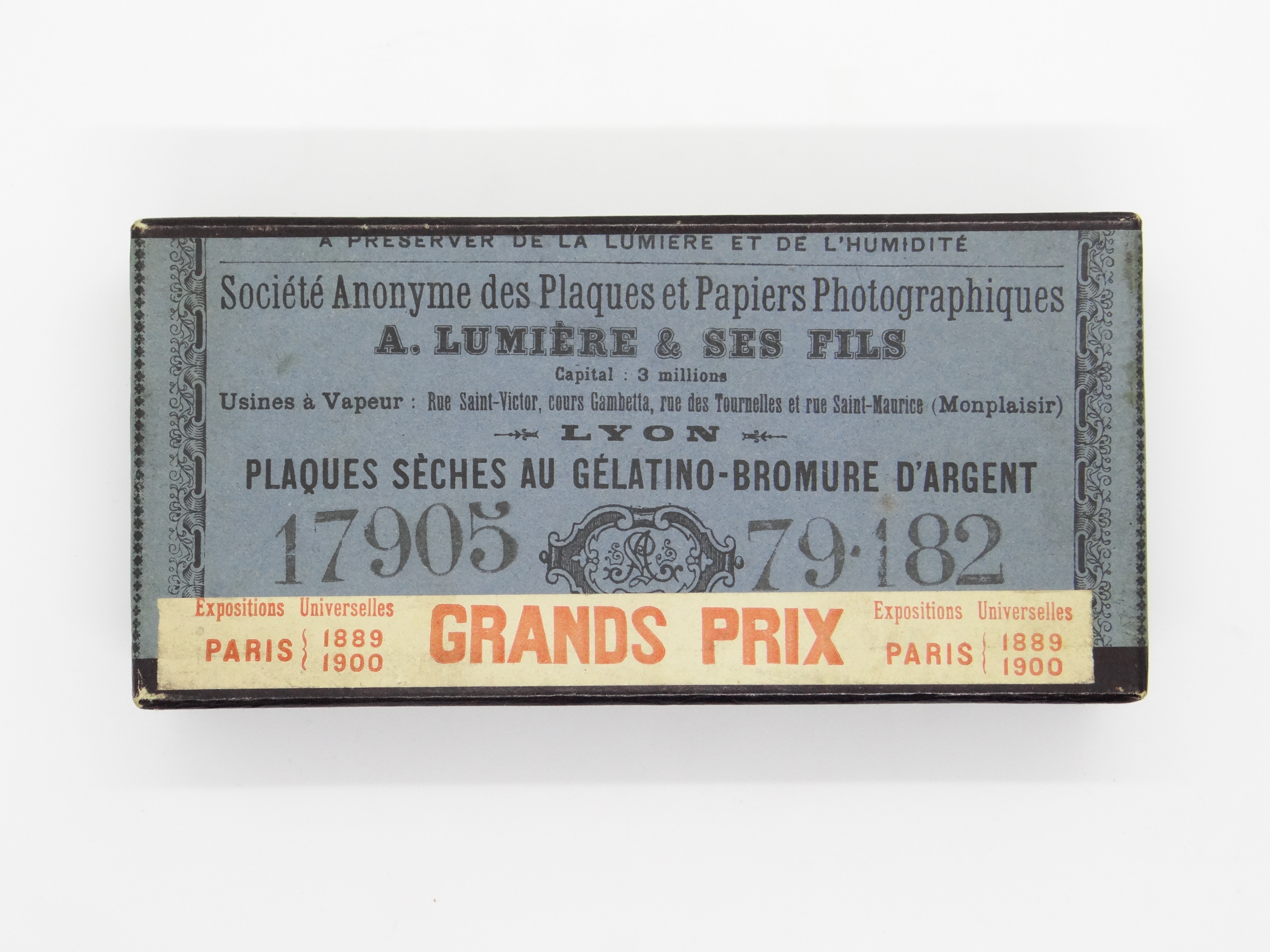 Boîte de plaques photographiques au gélatino-bromure d'argent, commercialisée au début XXe siècle par la société Lumière « société anonyme des plaques et papiers photographiques Antoine Lumière et ses fils ».